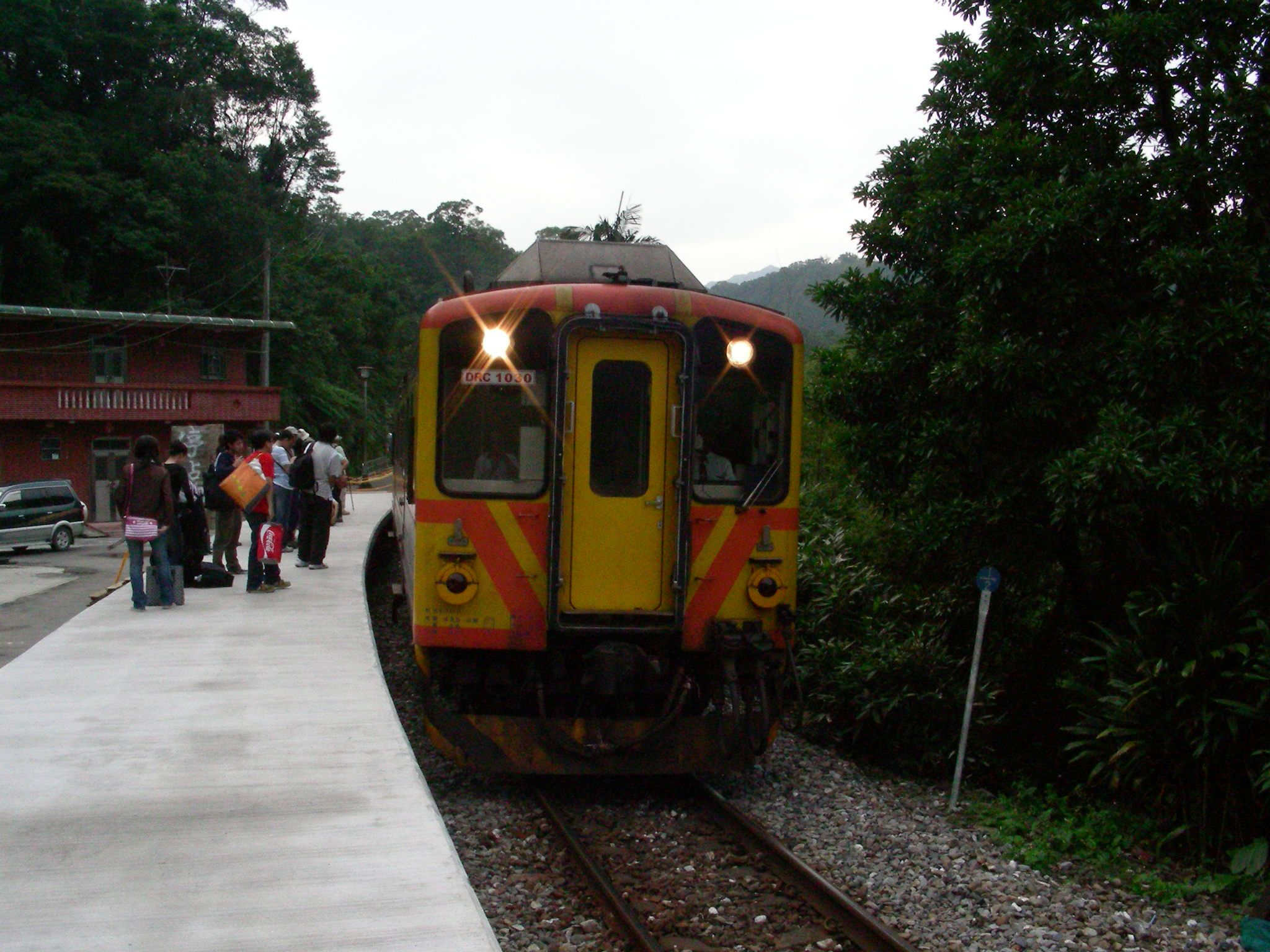 中文（台灣）: 臺灣鐵路管理局平溪線列車DRC1030停靠大華車站。